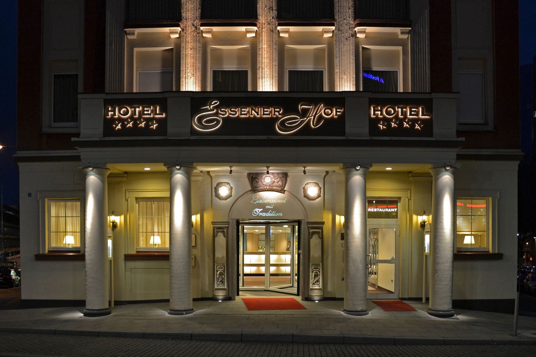 Hotel Essener Hof im Essener Stadtkern, Haupteingang